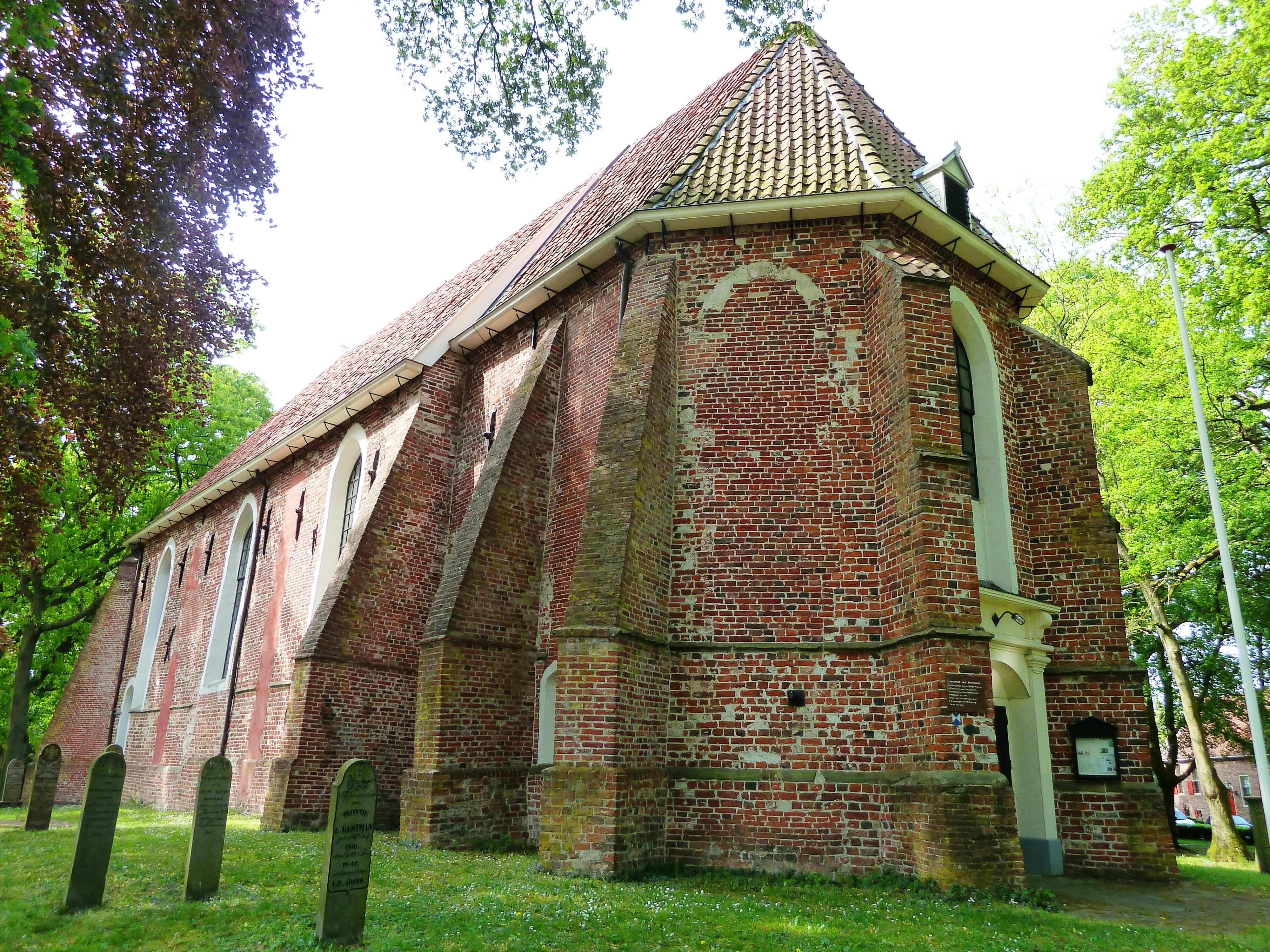 Zijaanzicht van de Magnuskerk van Bellingwolde (Bellingwedde, Groningen, Nederland).